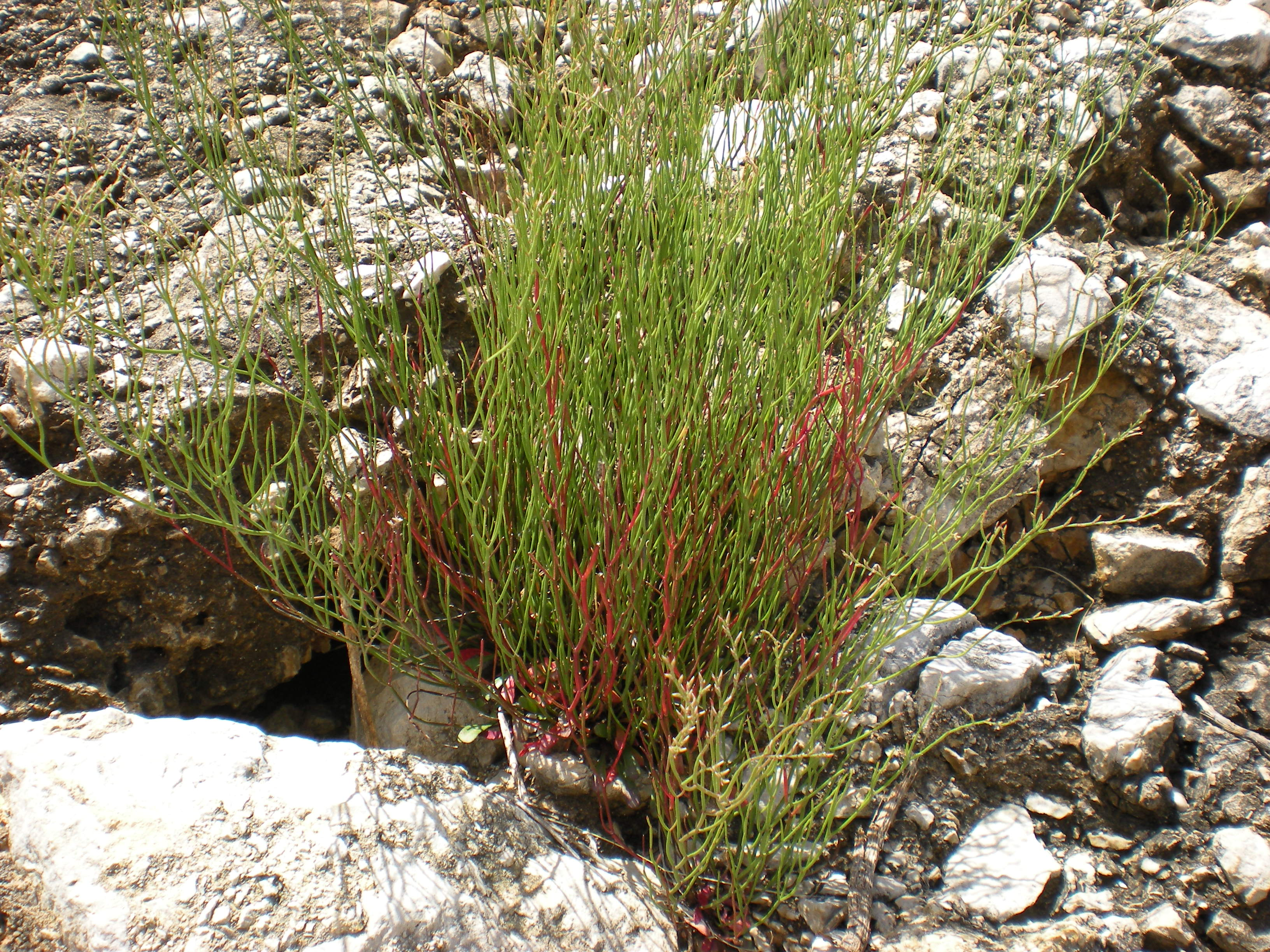 Limonium flagellare Riserva naturale Zingaro, Sicily